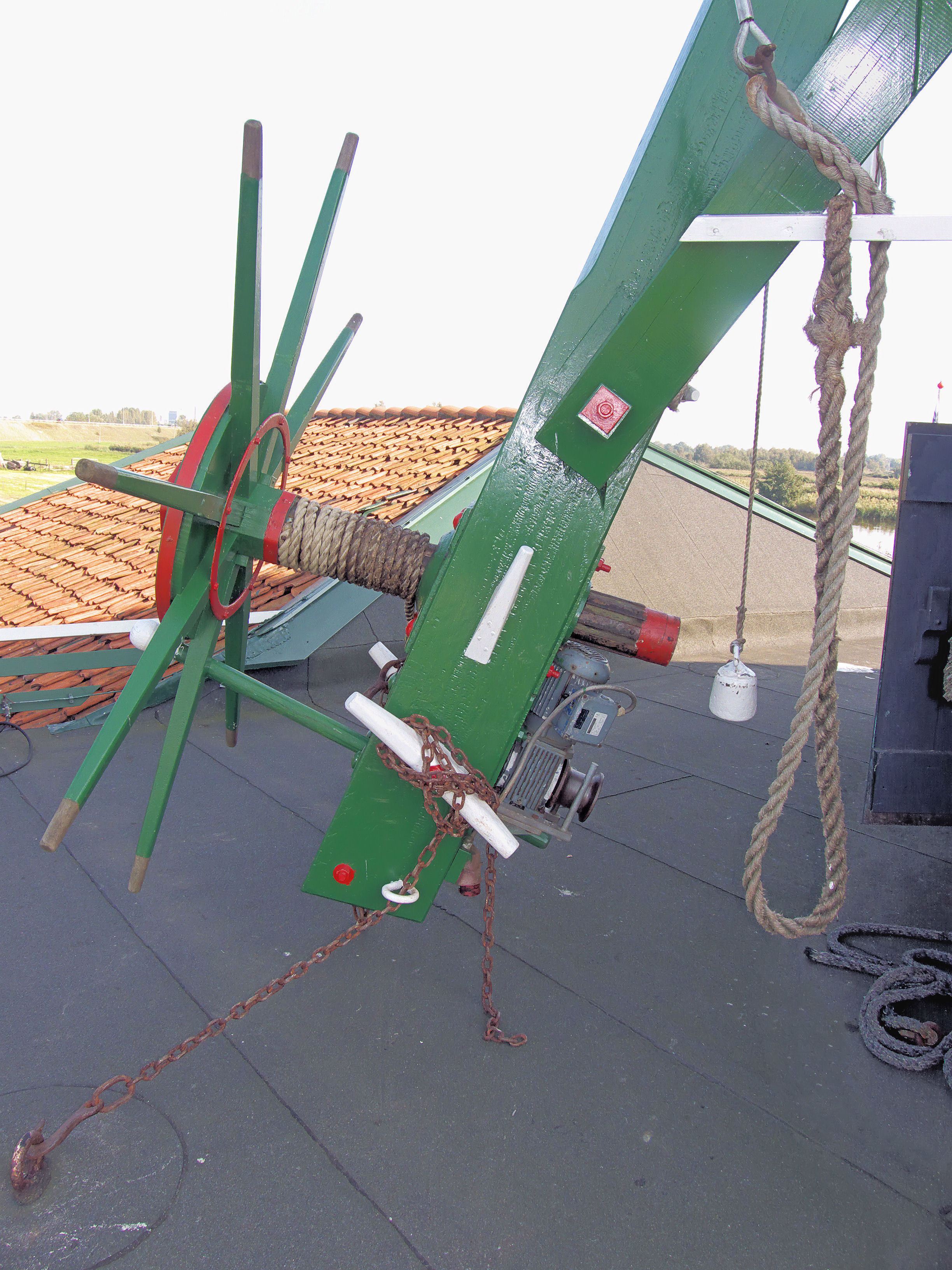 De Schoolmeester kruihaspel